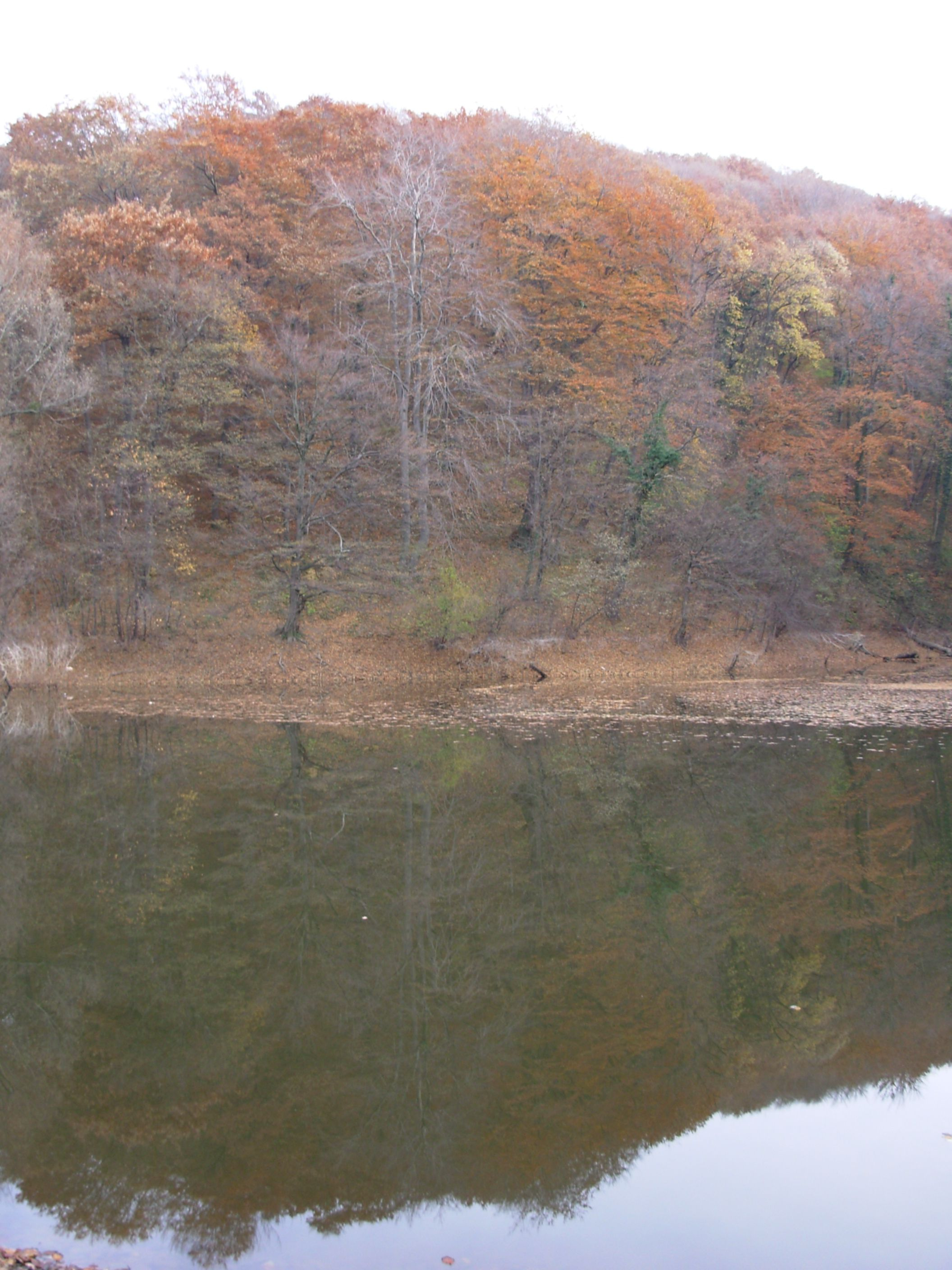 Lake of Popovica at Fruška Gora mountain, Vojvodina, Serbia.